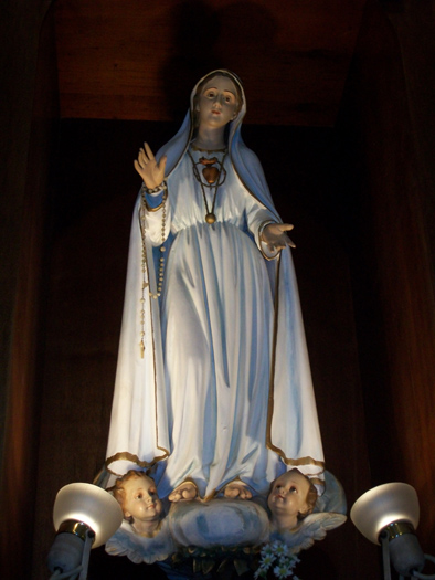 Imagem do Imaculado Coração de Maria presente na Igreja Católica do Sertão do Maruim.